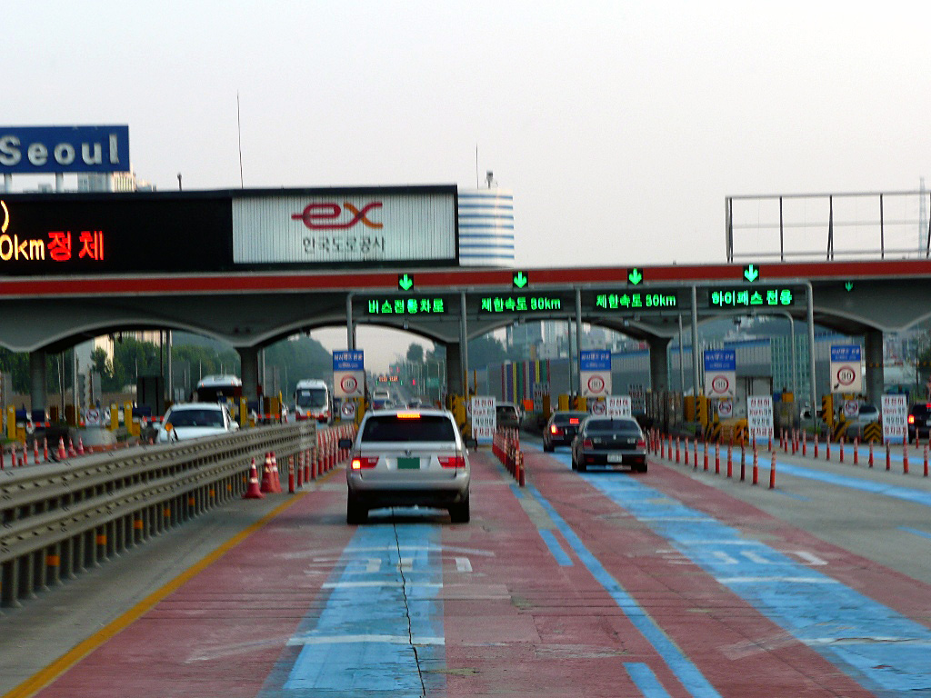 경부고속도로 서울요금소